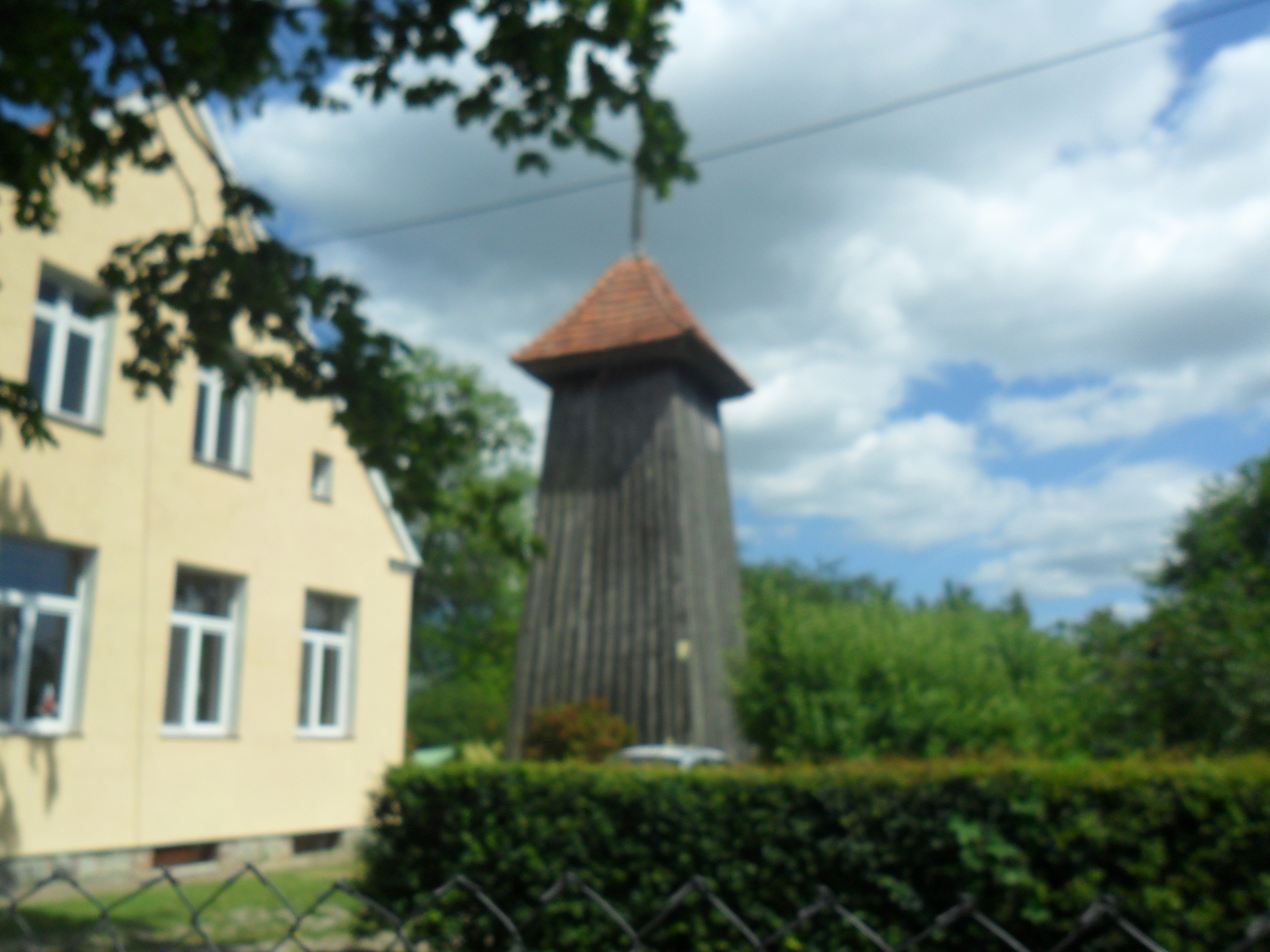 Kosakowo, dzwonnica, 1657